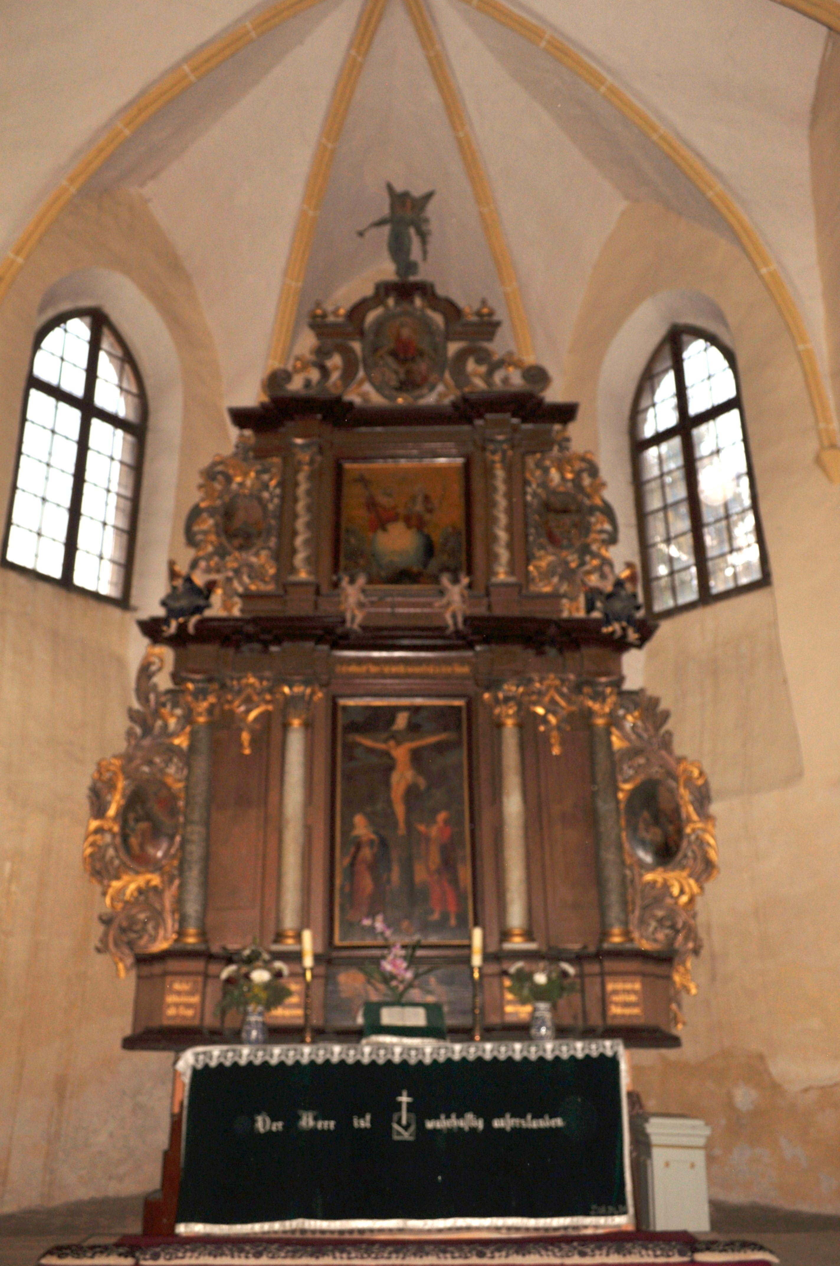 Biserica evanghelică din Cristian, județul Siniu 01